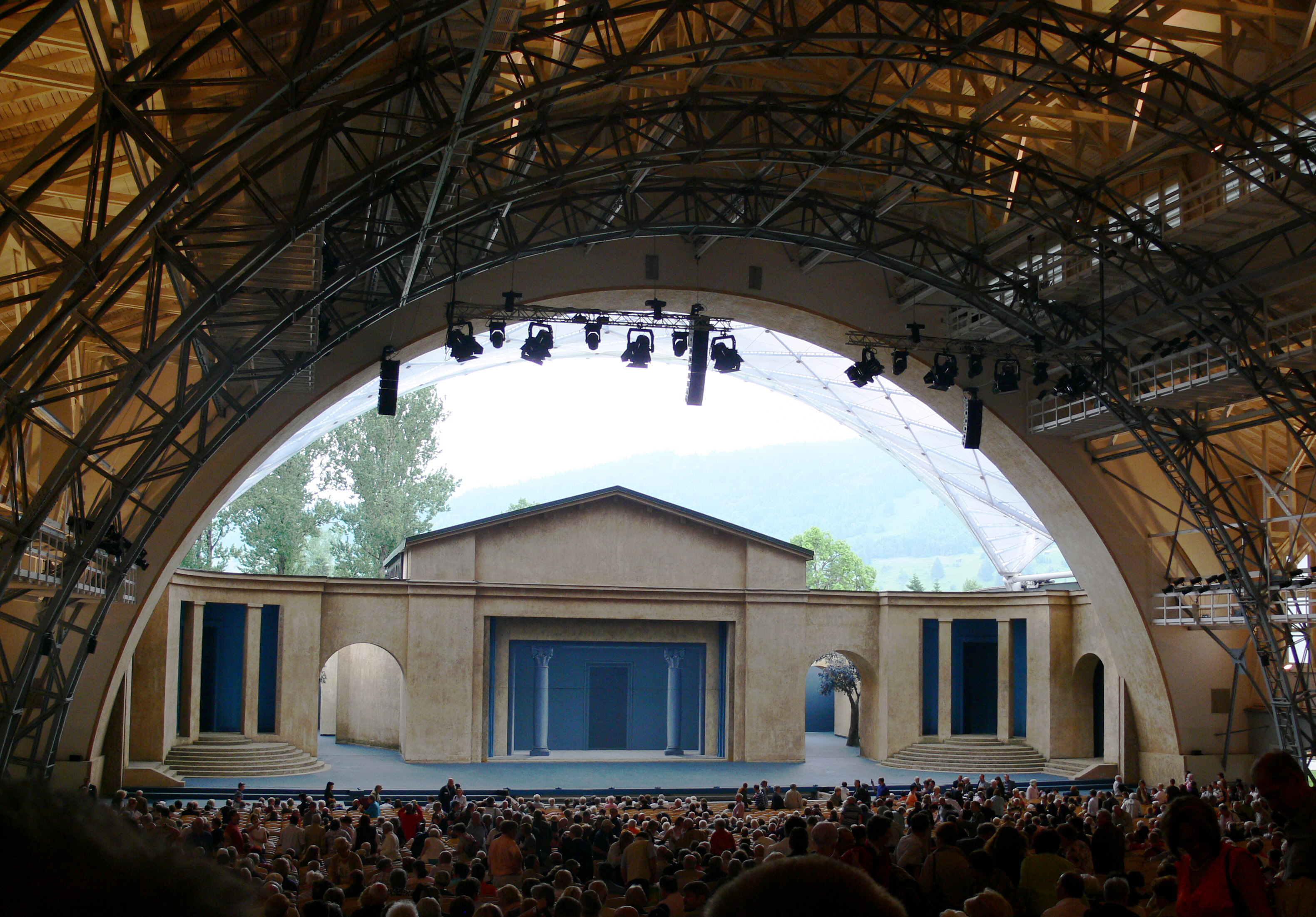 Oberammergau, Passionstheater Blick zur Bühne